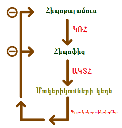 Գլյուկոկորտիկոիդների հետադարձ կապը